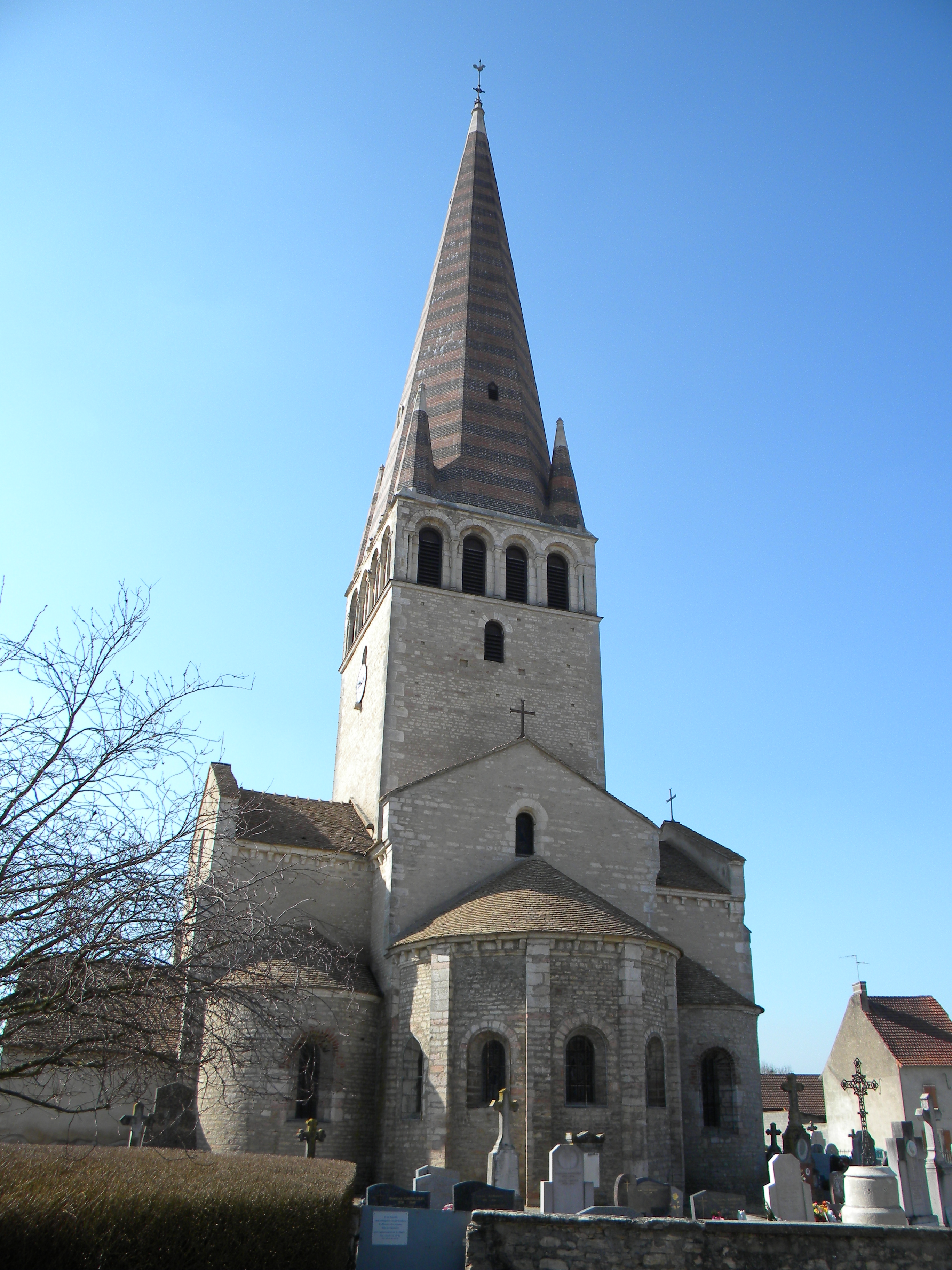 Eglise de Ciel